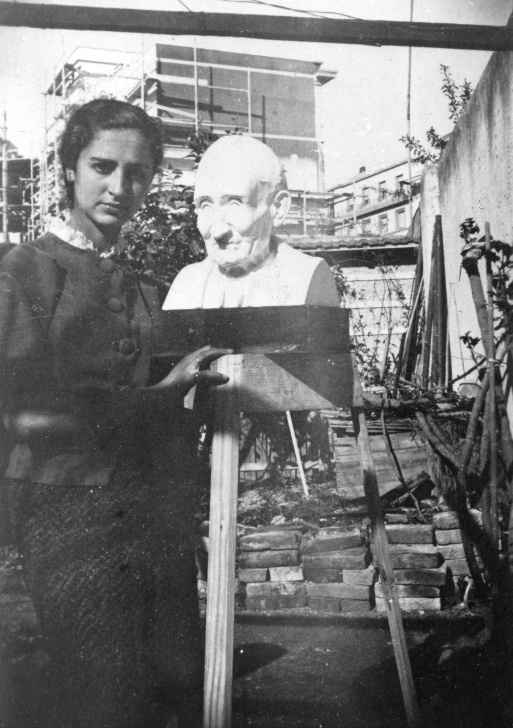 Anna Cabras Brundo all'età di 16 anni con il busto in gesso raffigurante il nonno